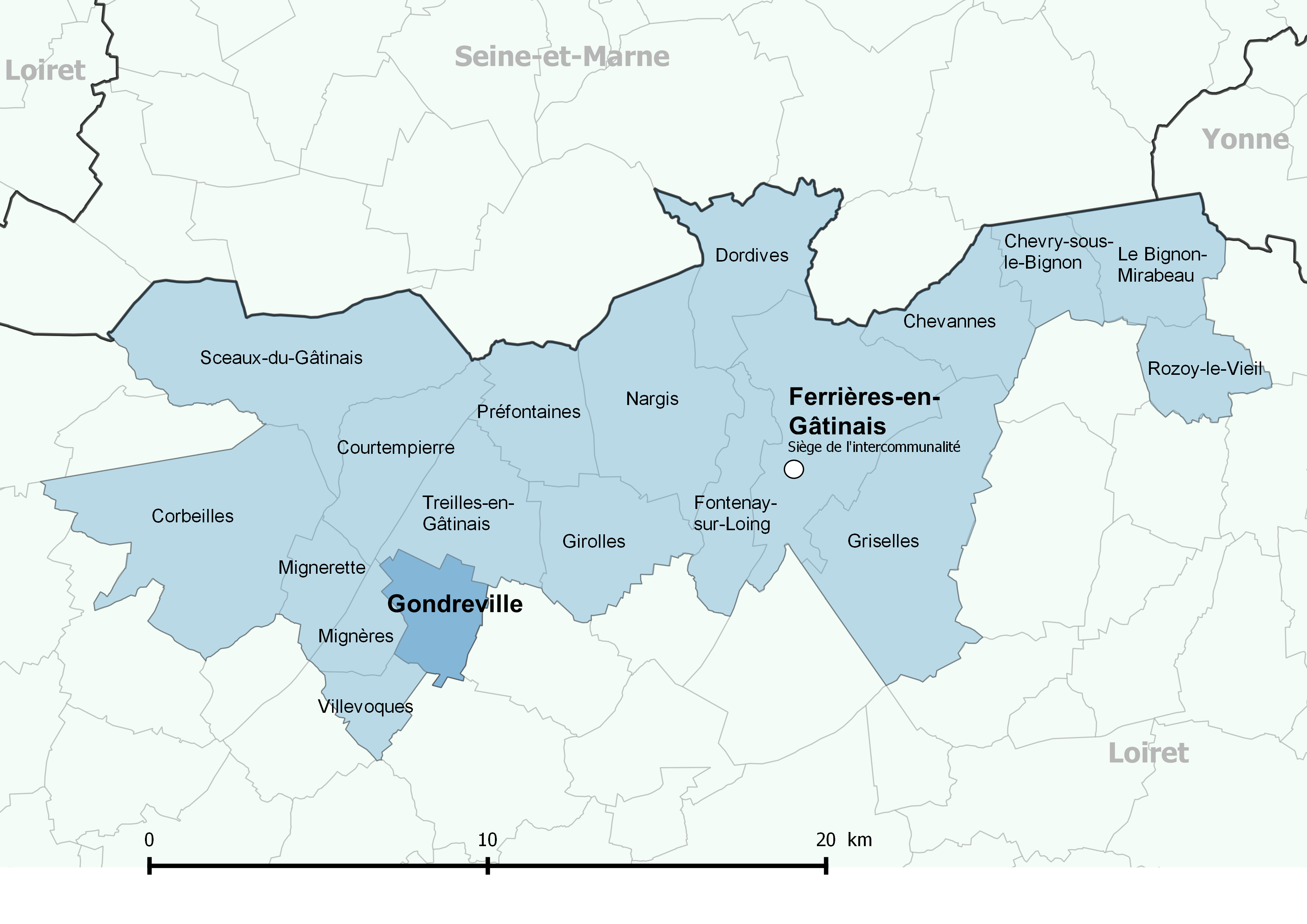 Périmètre de la communauté de communes des Quatre Vallées (Loiret) - Positionnement de la commune de Gondreville.